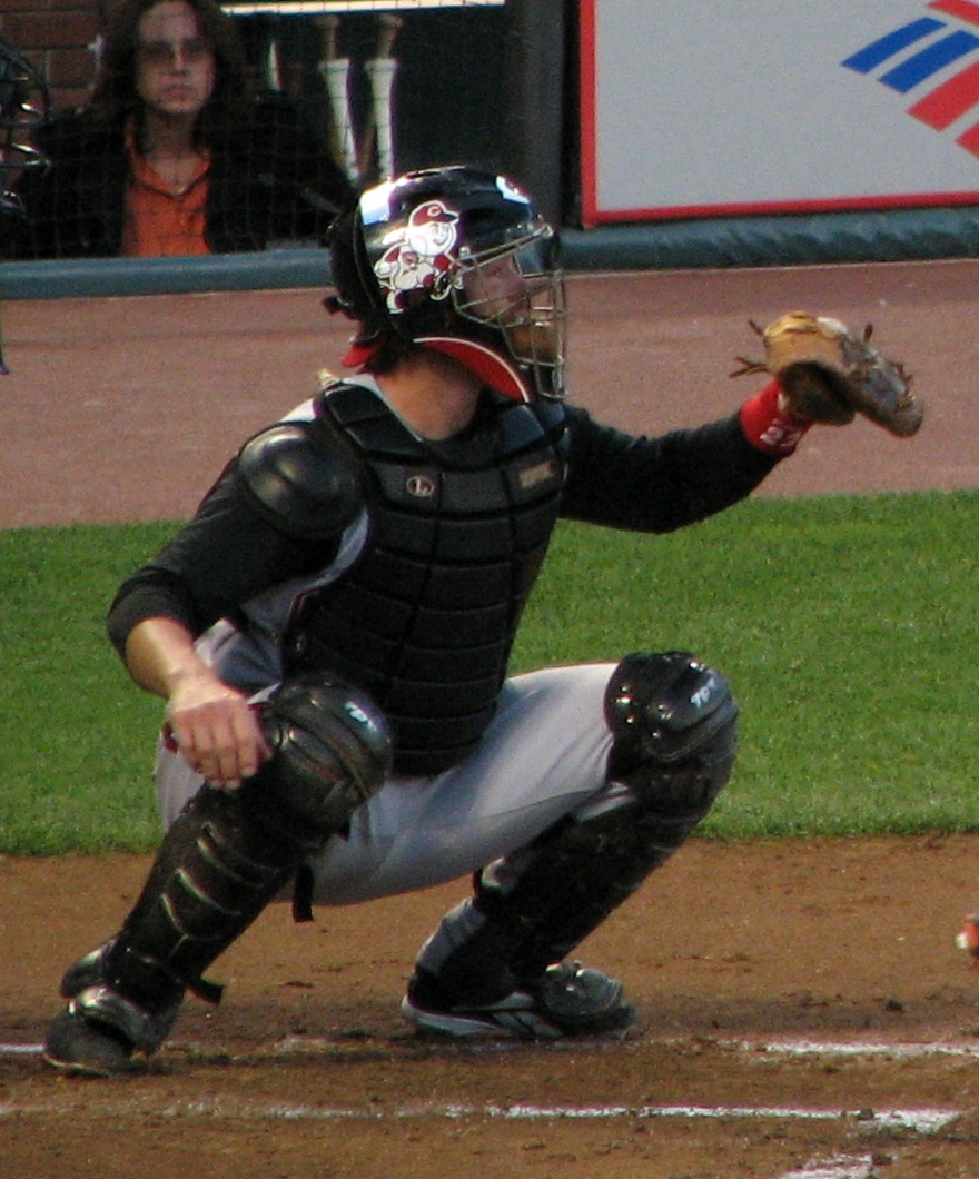 Jason LaRue